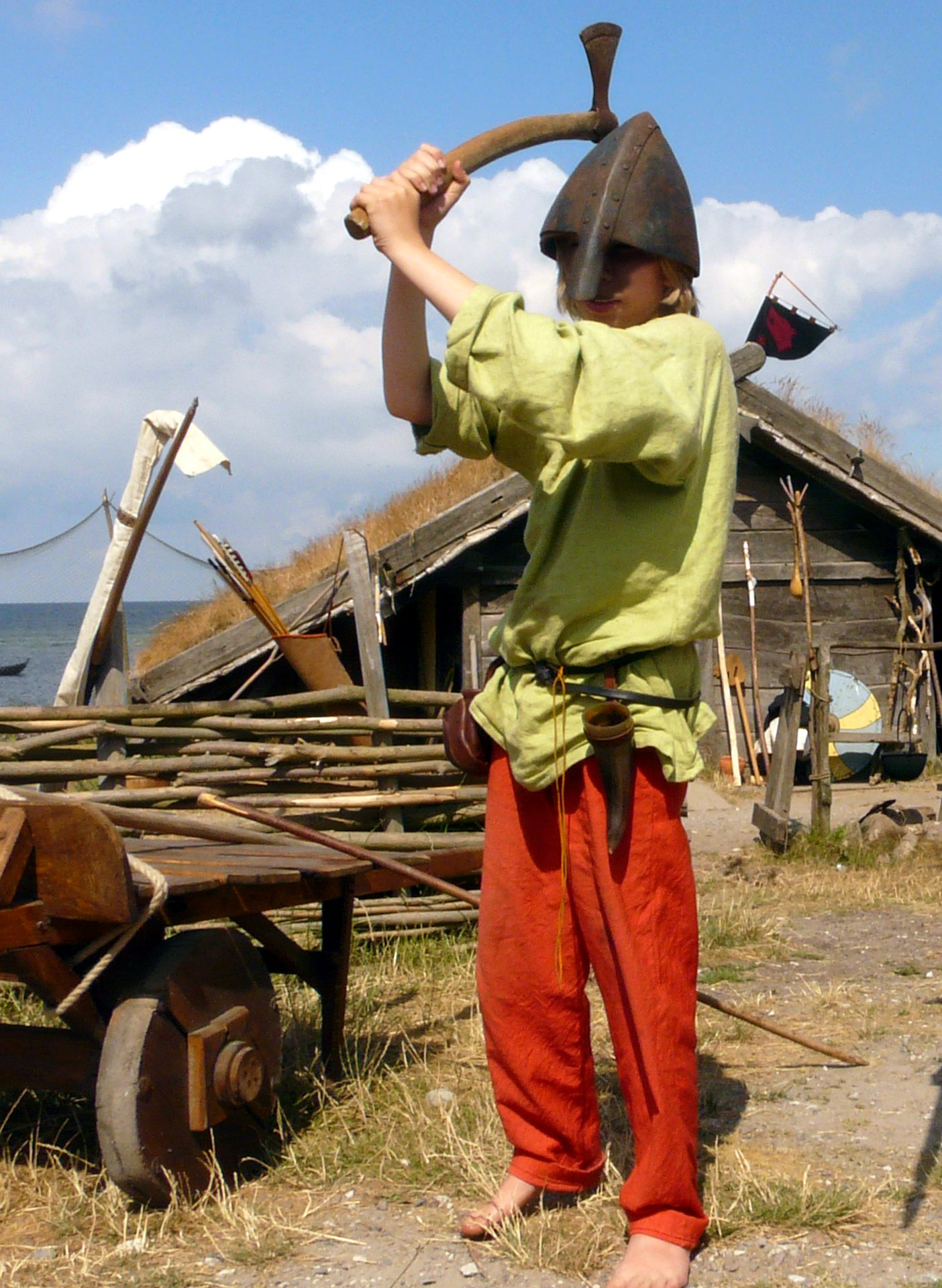 Junger "Wikinger" im "Vikingareservat Foteviken" (Höllviken, Schweden)